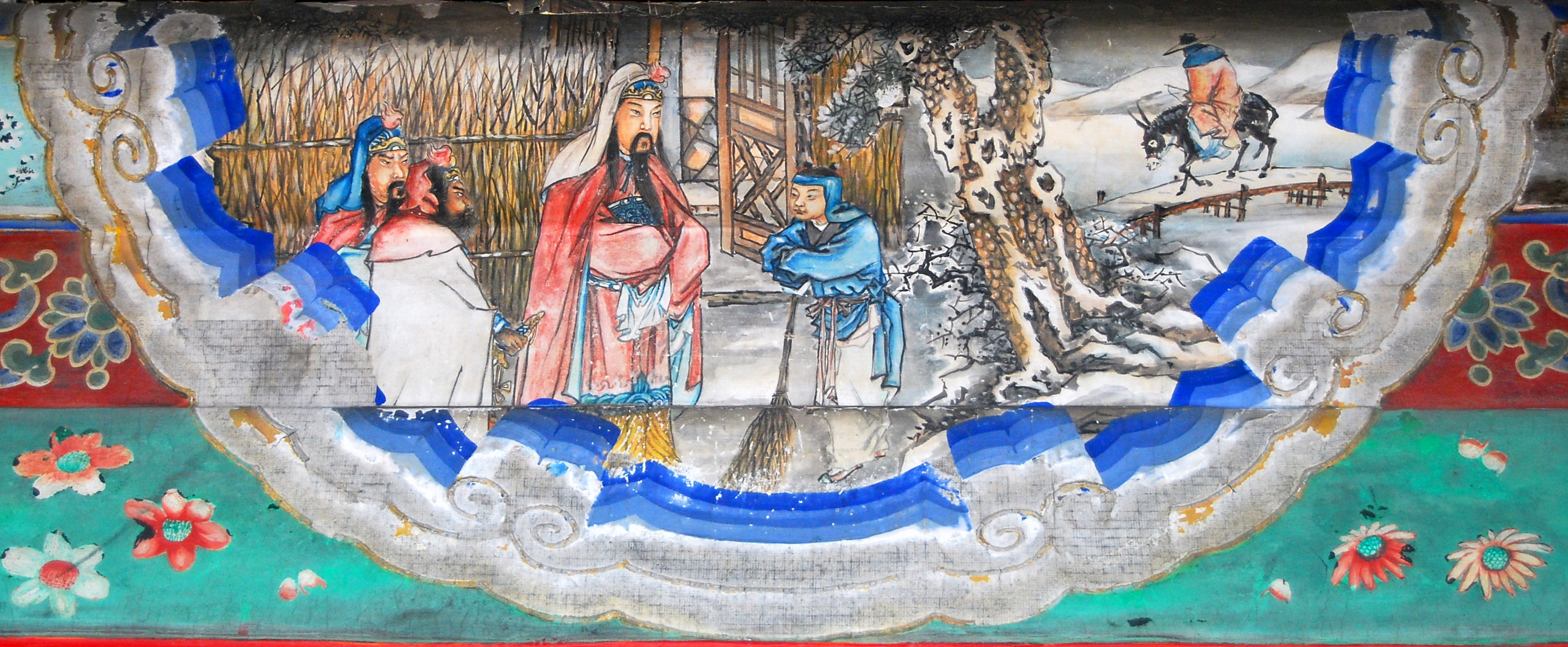 颐和园长廊上的彩绘：三顾茅庐